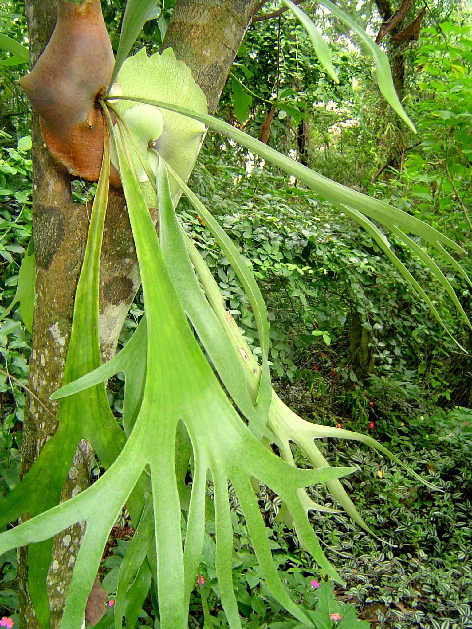 Platycerium bifurcatum — Santa Catarina, Brazil..